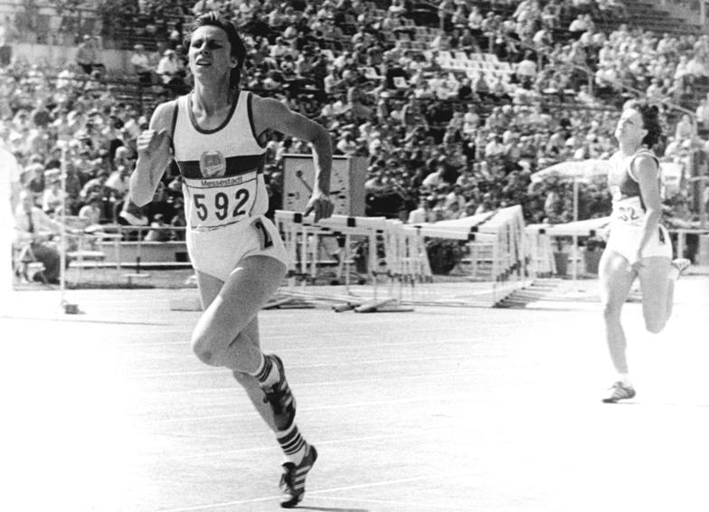 Marita Koch, Christina Brehmer ADN-ZB Kluge 02.07.78 Leipzig: 29. DDR-Meisterschaften der Leichtathletik-Marita Koch lief Weltrekord- Für den ersten Weltrekord der Titelkämpfe sorgte am Nachmittag des 2.7. Marita Koch (SC Empor Rostock-l.) über 400 m in 49,19 s. Die 21jährige verbesserte die bisherige Bestmarke der Polin Irena Szewinska um eine Zentelsekunde. Marita Koch ist auch im Besitz des Weltrekordes über 200 m. Hinter der neuen Titelträgerin wurde Christina Brehmer (SC Dynamo Berlin-r.) Zweite in 50,15 s.